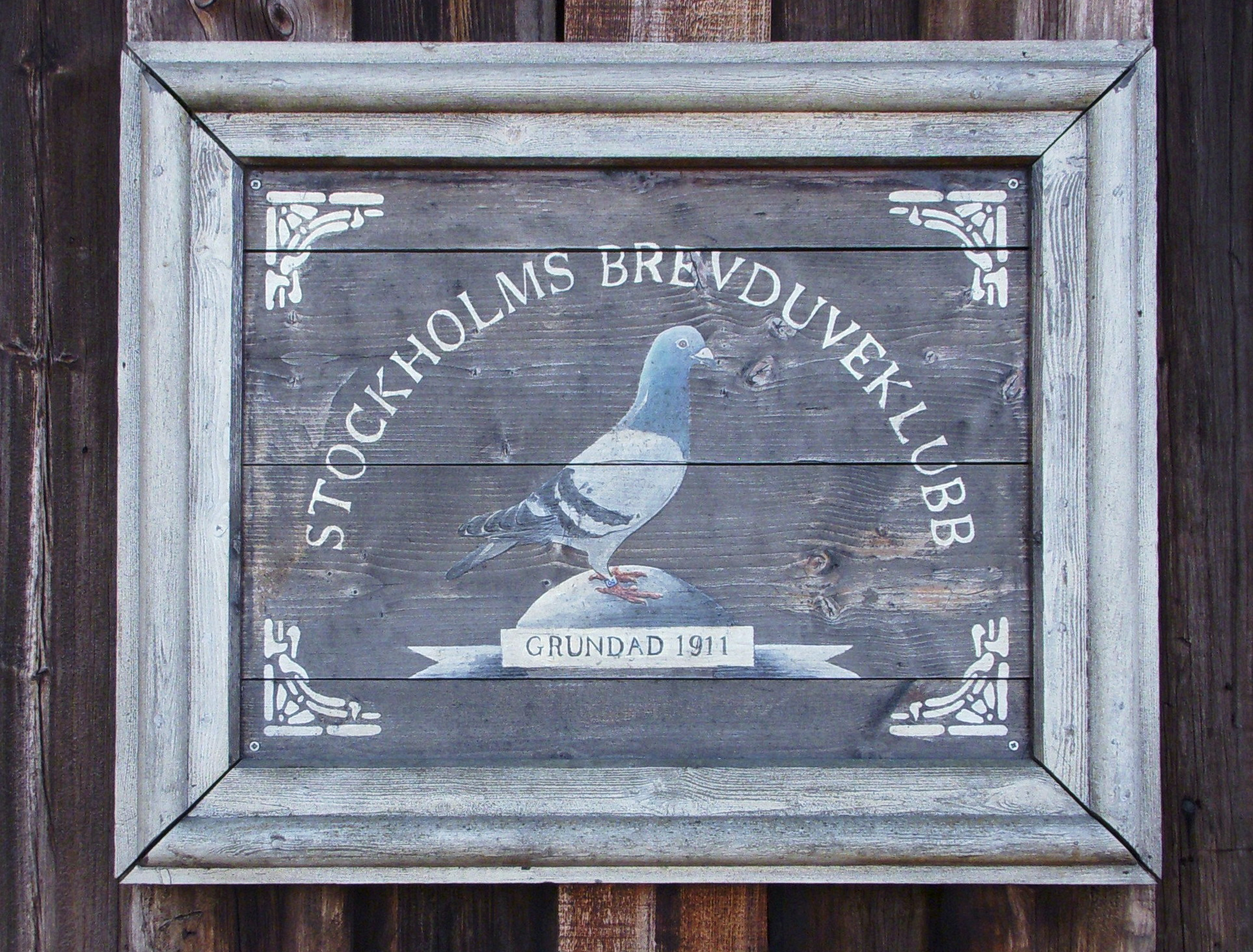 Stockholms brevduveklubb